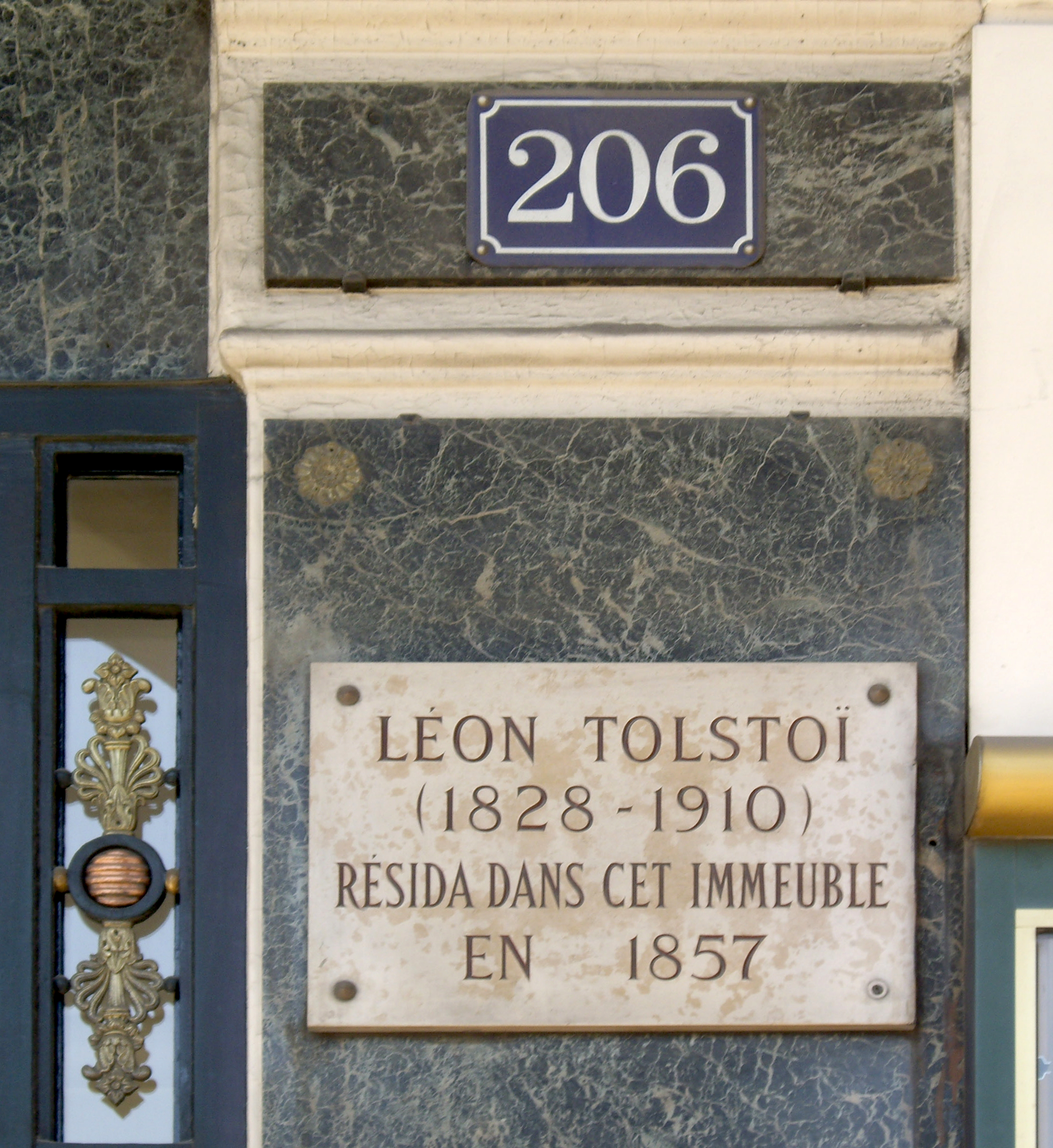 Plaque apposée au n° 206 de la rue de Rivoli, Paris 1er, où résida Léon Tolstoï (1828-1910) en 1857.